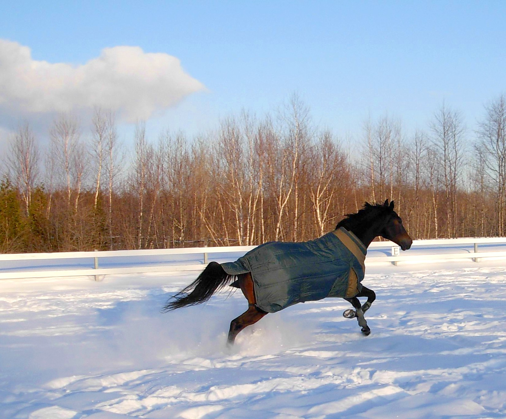 Un cheval bai-brun portant une couverture pour le protéger du froid